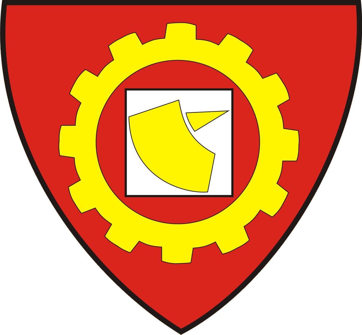 Znak města Vratimov.